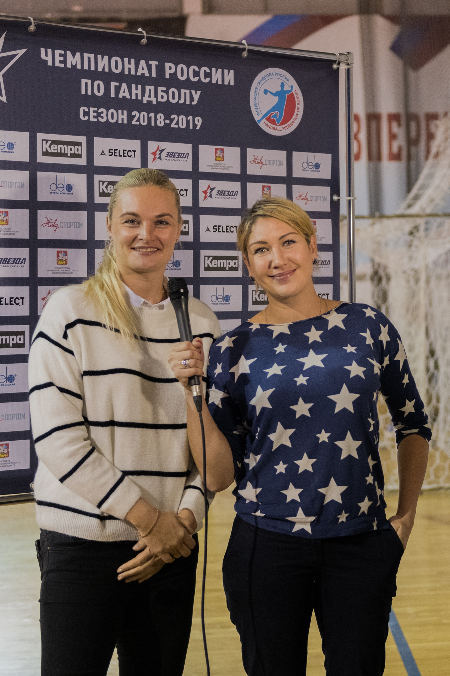 В прошлом известная гандболистка и капитан ГК "Звезда"